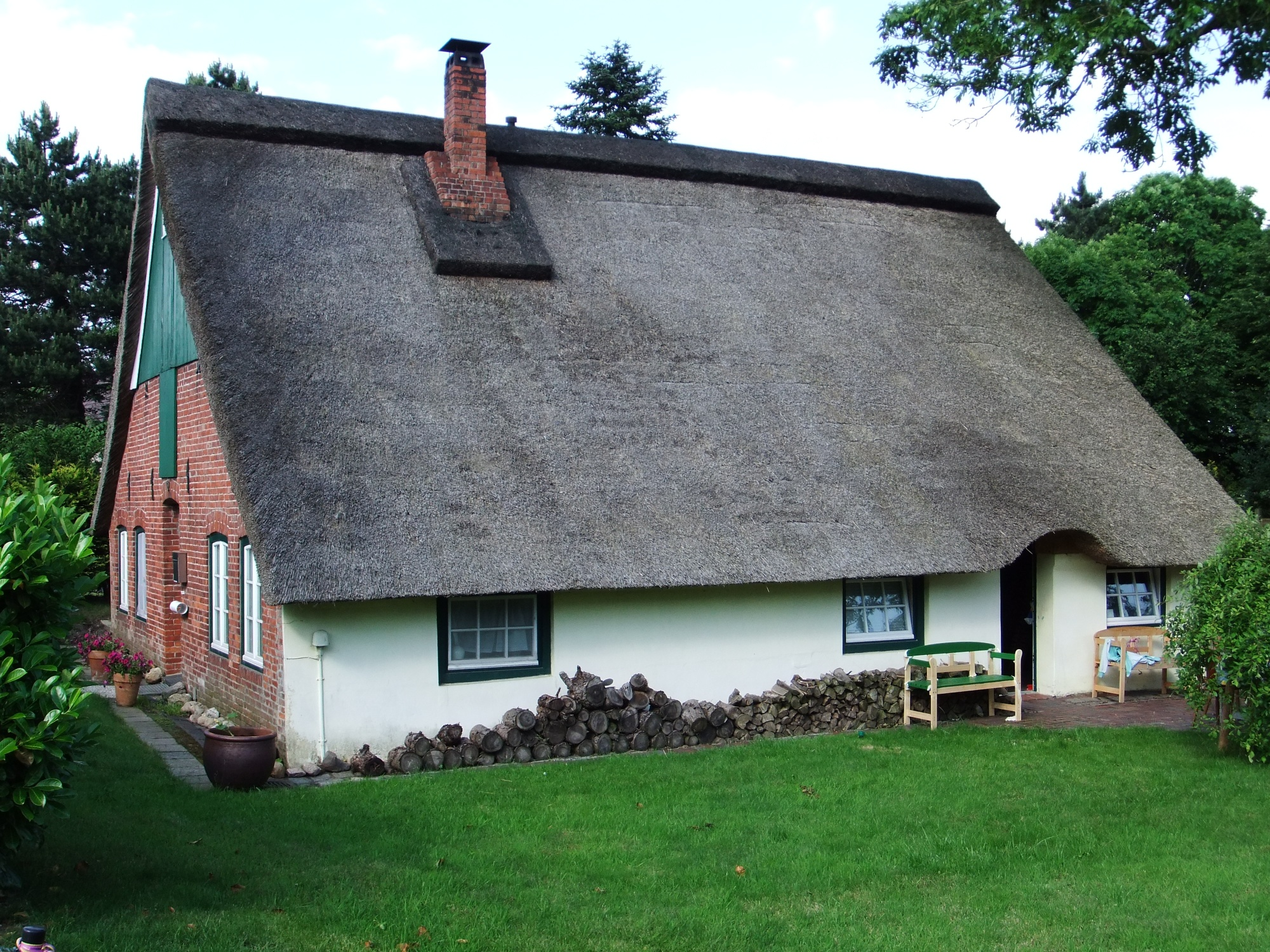 Hof Sibbern, Gesindehaus in Bremerhaven, Morgensternstraße 9. Das abgebildete Objekt ist ein geschütztes Kulturdenkmal in der Freien Hansestadt Bremen, mit der Nr. 1651 beim Landesamt für Denkmalpflege registriert.